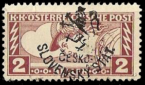 Провизорная марка Ческе-Будеёвице; надпечатка на марке Австрии 1917 года